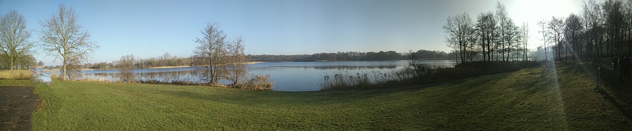 Pano over Wijthmenerplas